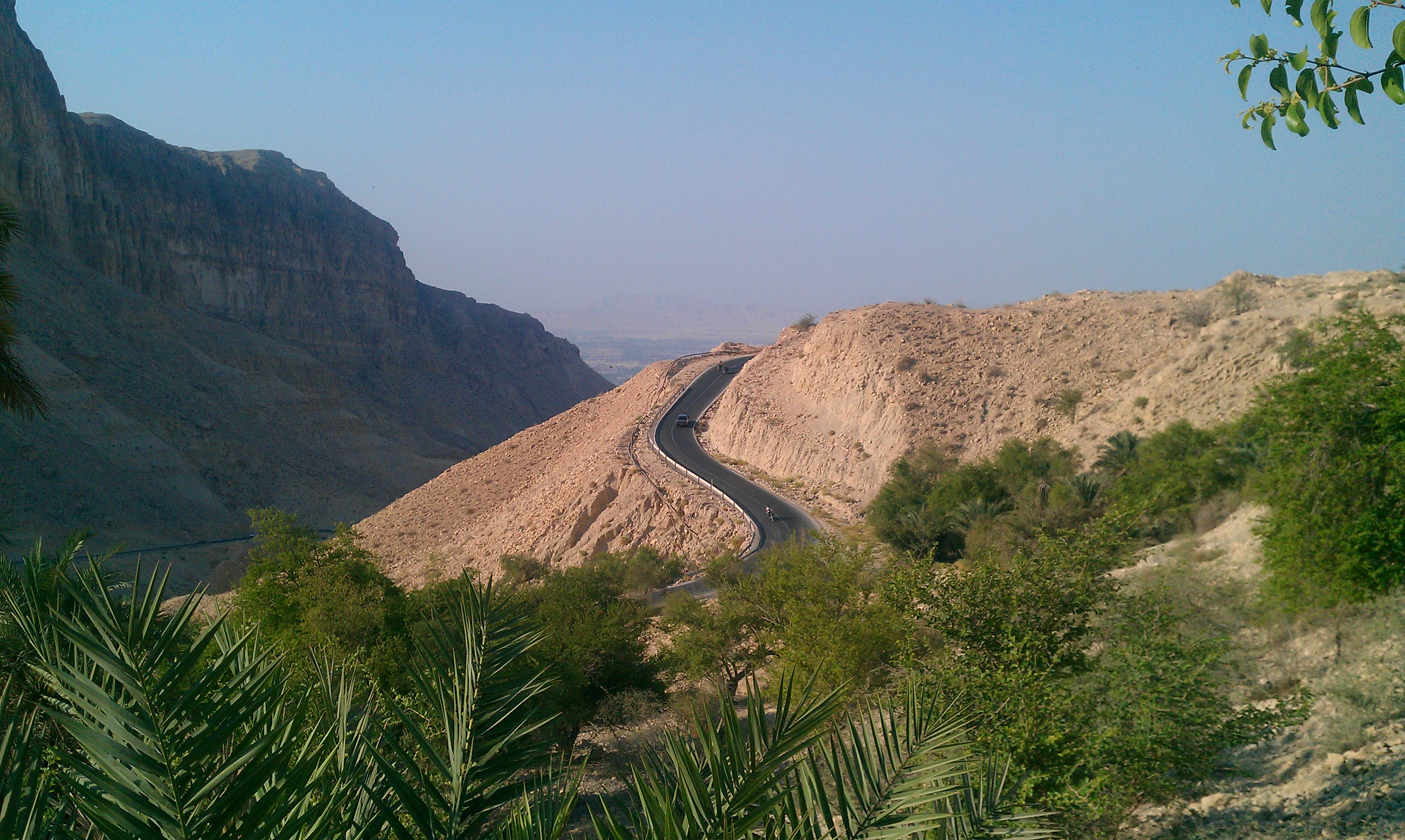 foumestan garden